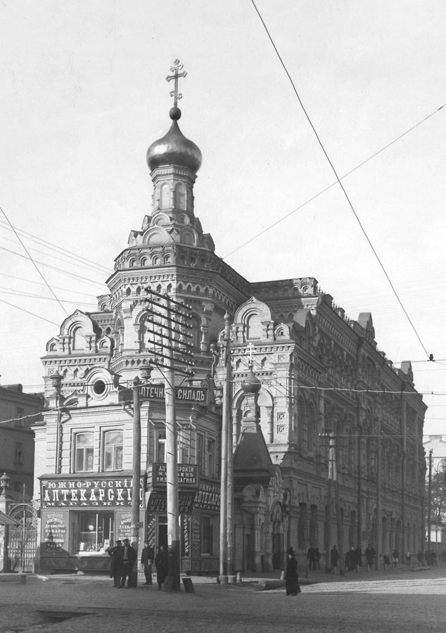 Будинок Релігійно-просвітницького товариства в Києві, початок ХХ сторіччя